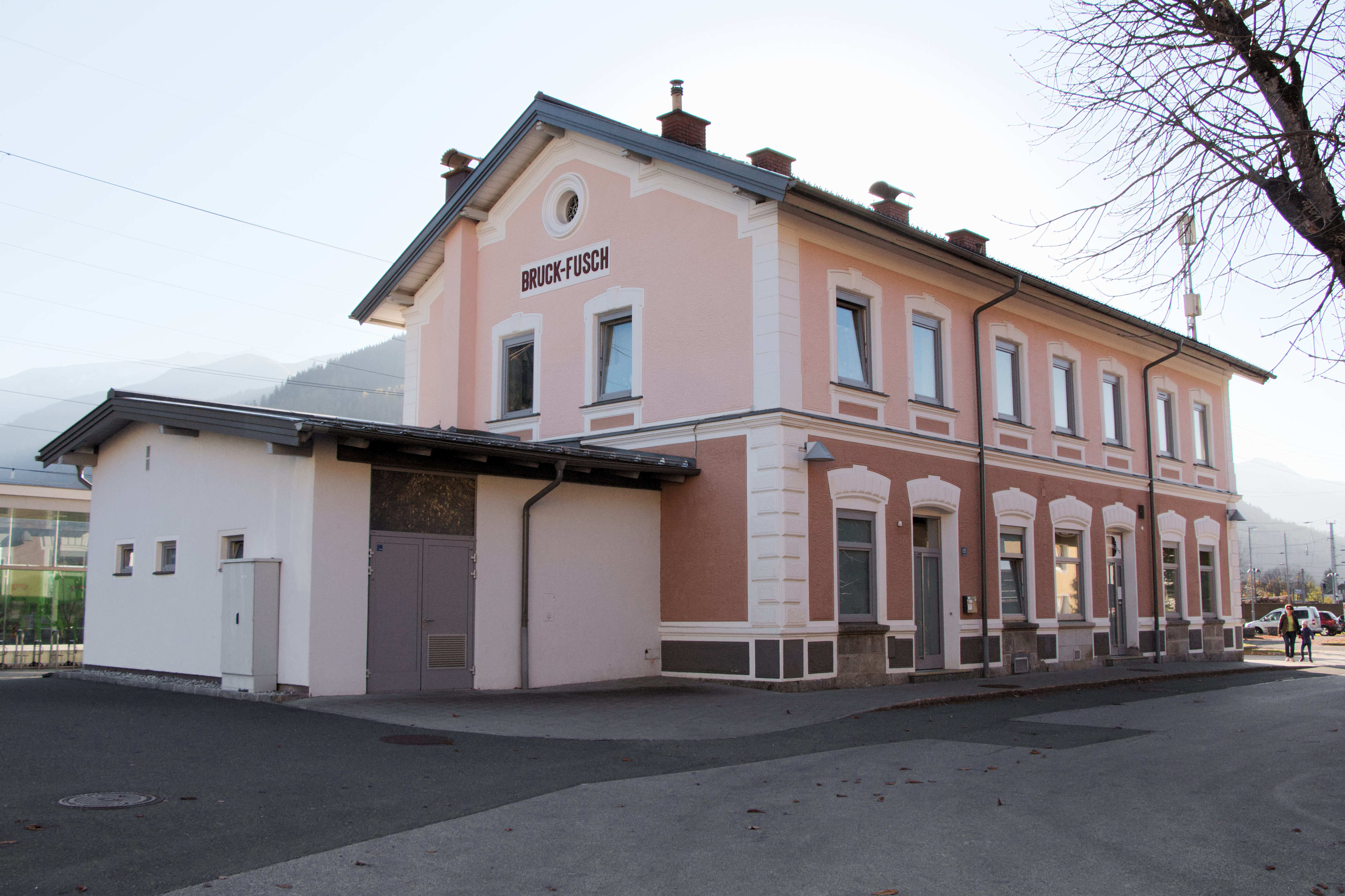 Bruck an der Großglocknerstraße (Bezirk Zell am See): Bahnhof Bruck-Fusch - Aufnahmegebäude